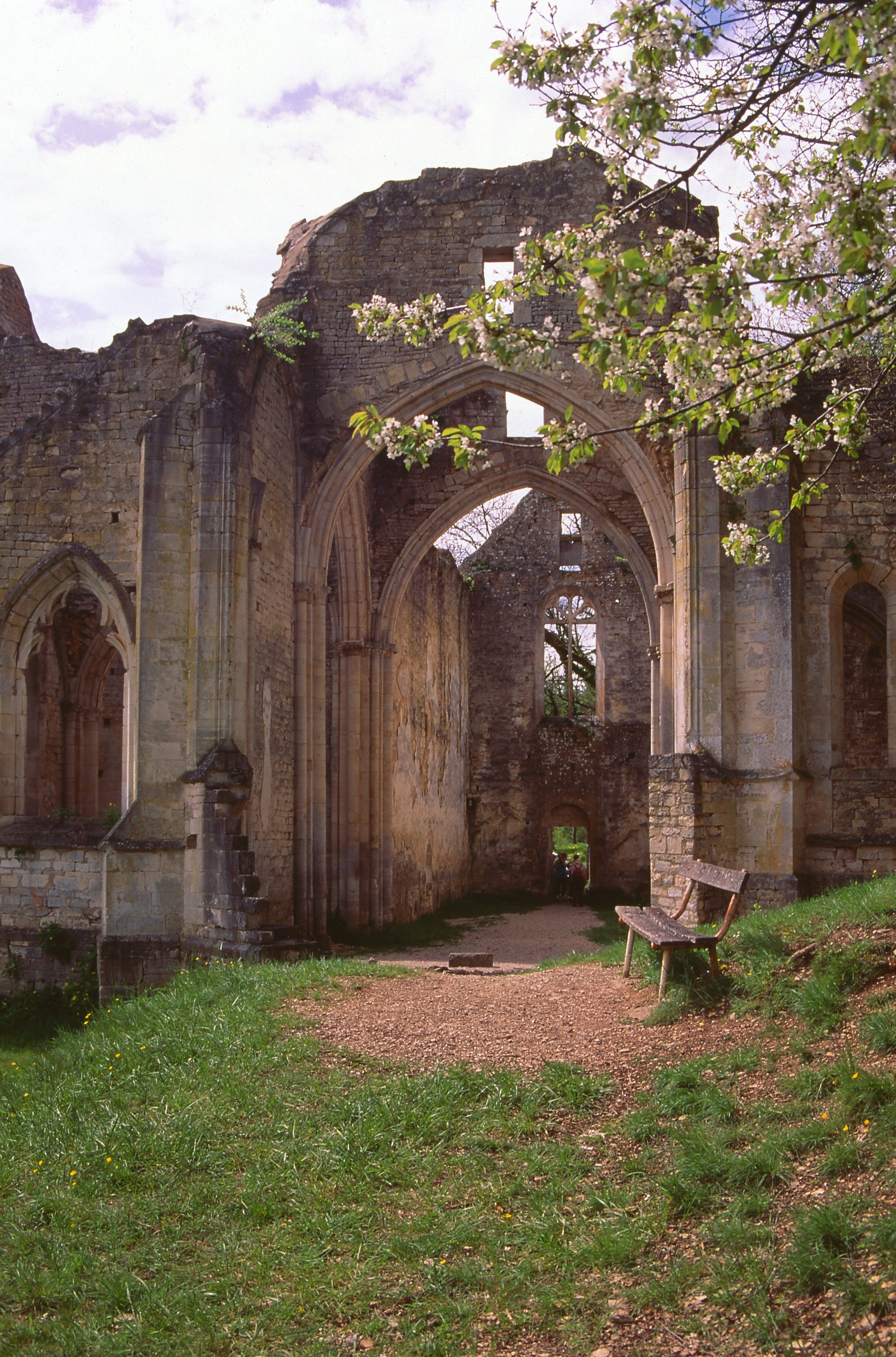 Ruines de l'abbaye Ste-Marguerite à Bouilland